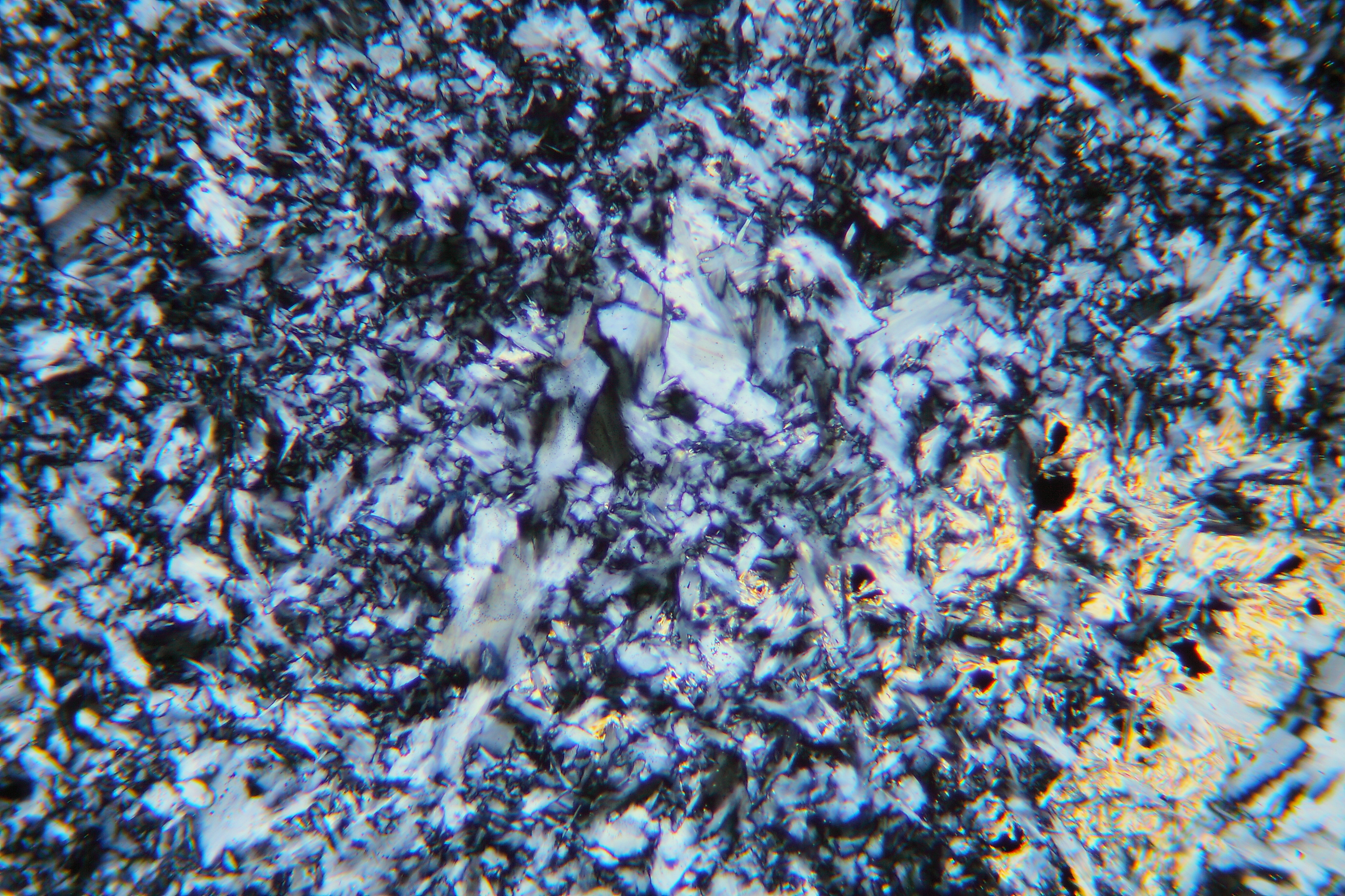 Blättriger Antigorit in einem Serpentinit von Erbendorf/Oberpfalz (Dünnschliff, XPL)